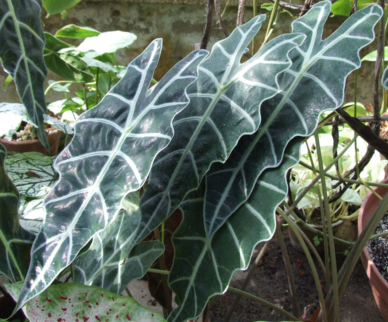 Alocasia x amazonica